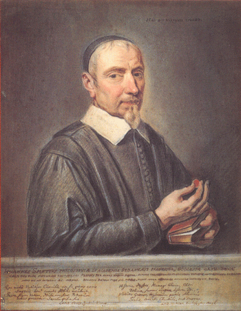 Pasteltekening van Rutger van Langevelt (1669). Kopie naar een geschilderd portret van ca. 1630 - 1640. Waarschijnlijk vervaardigd door SMetius' oudste zoon. Museum Het Valkhof.